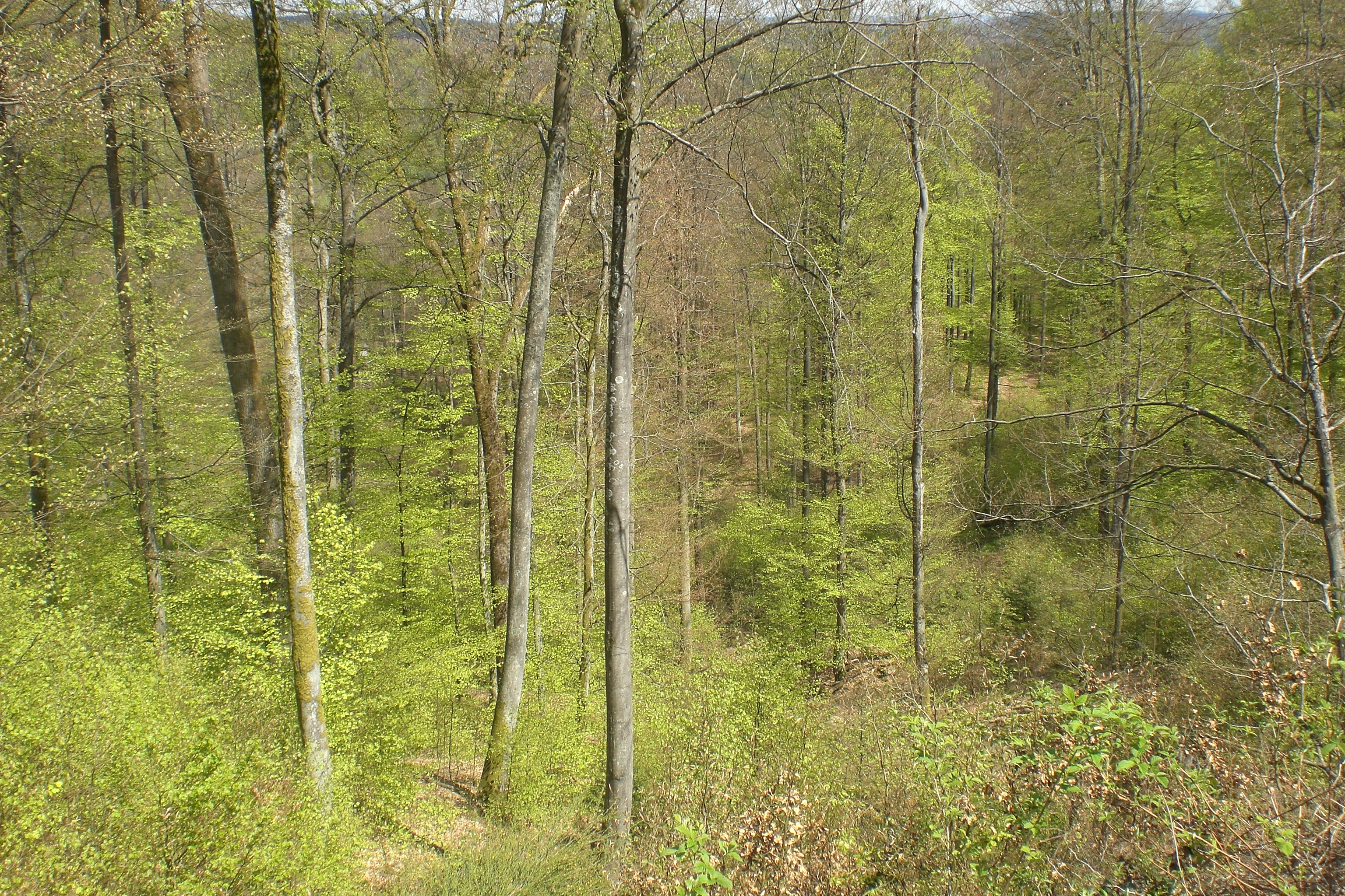 Mitten in der Frankenweide im Pfälzerwald